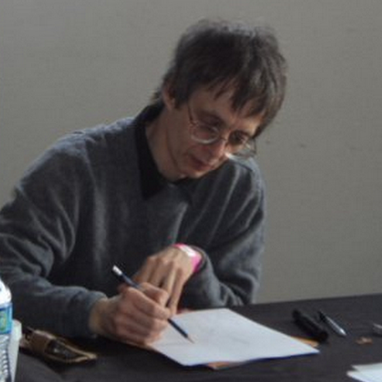 Marco Soldi al Roma Comics & Games 2011.